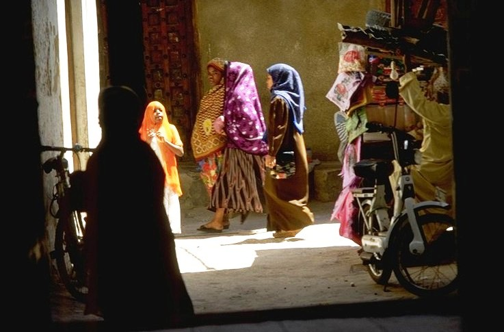 Women in Zanzibar